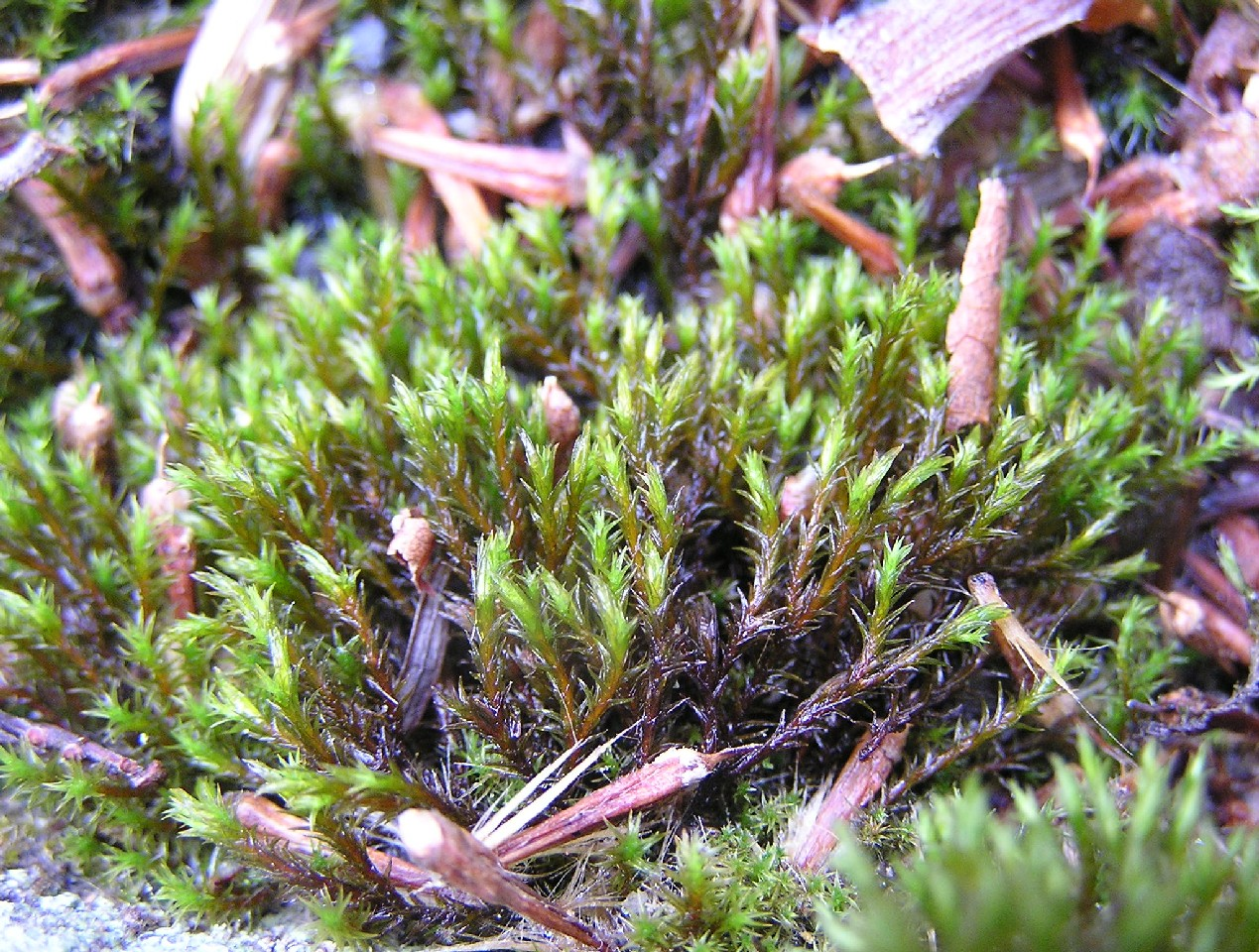 Schistidium apocarpum, aufgenommen auf dem Alten Friedhof in Bonn